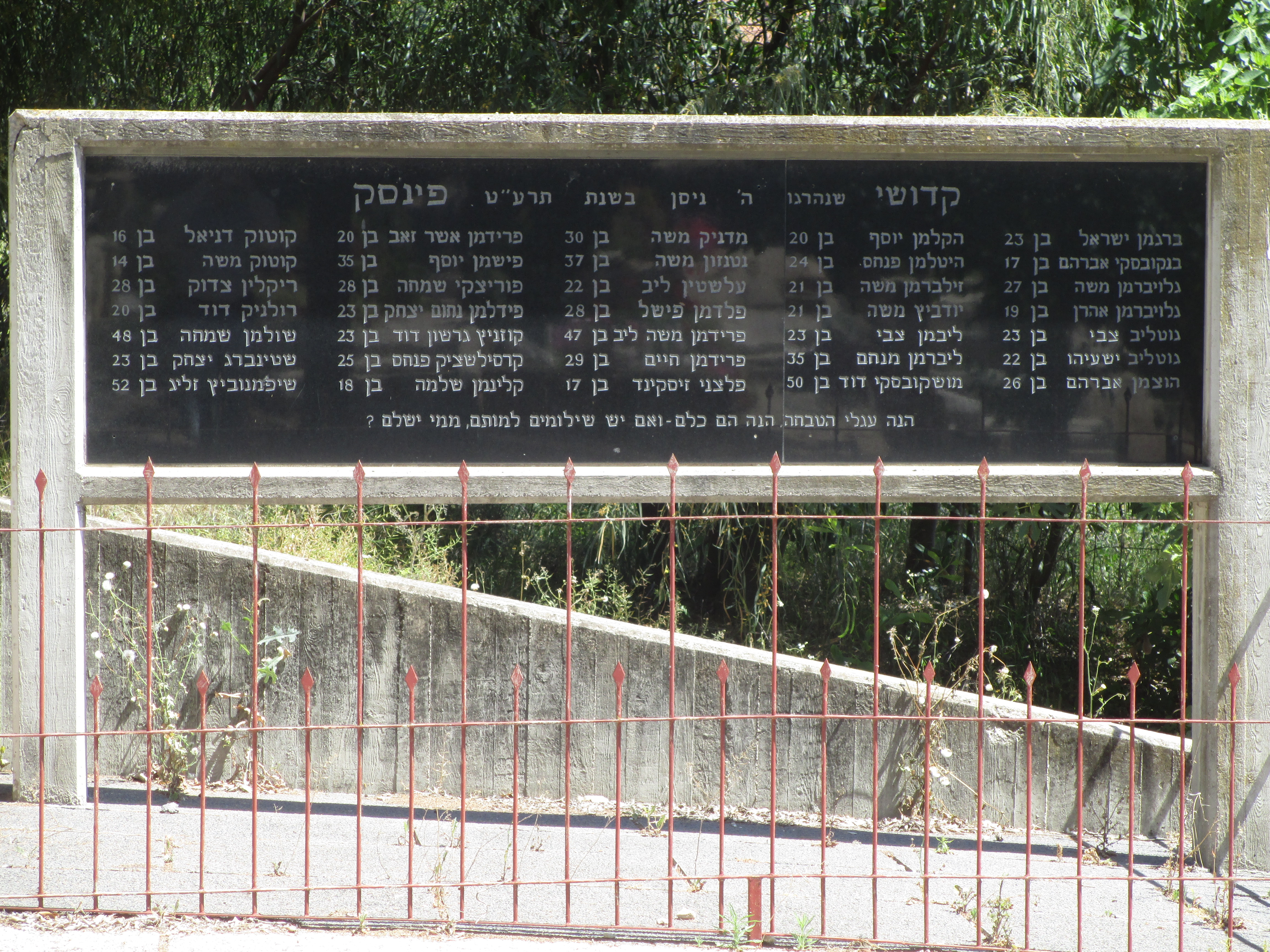 אנדרטת זיכרון בקיבוץ גבת לטבח היהודים בפינסק ב-1919